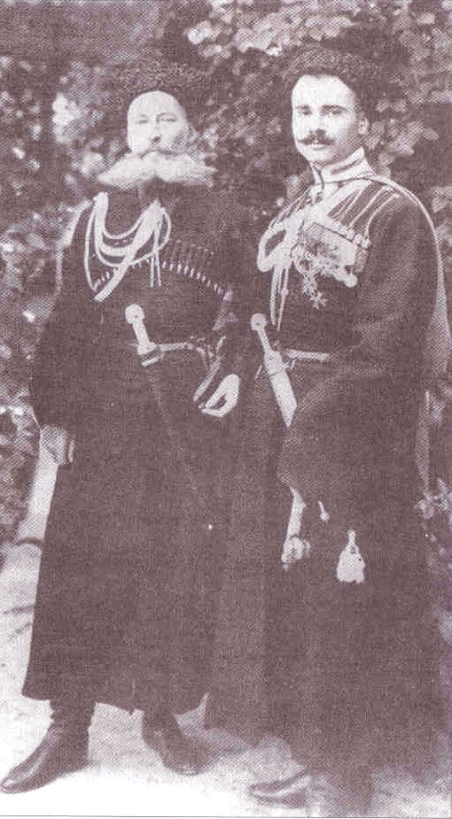 Полковник Г. Зелінський(Зеленевський) та І. Полтавець-Остряниця, генеральний писар Гетьмана України, наказний отаман Українського Вільного козацтва